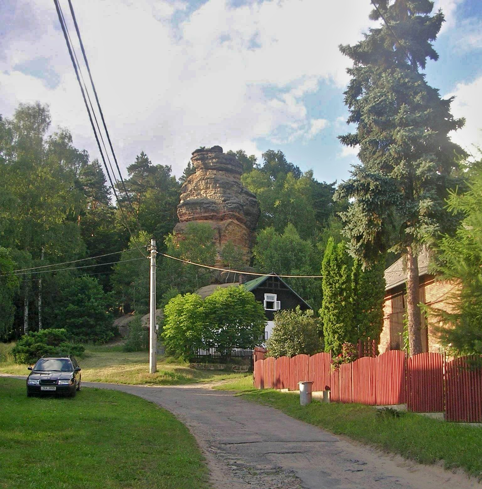 Vranov, vesnice tvořící místní část města Mimoň